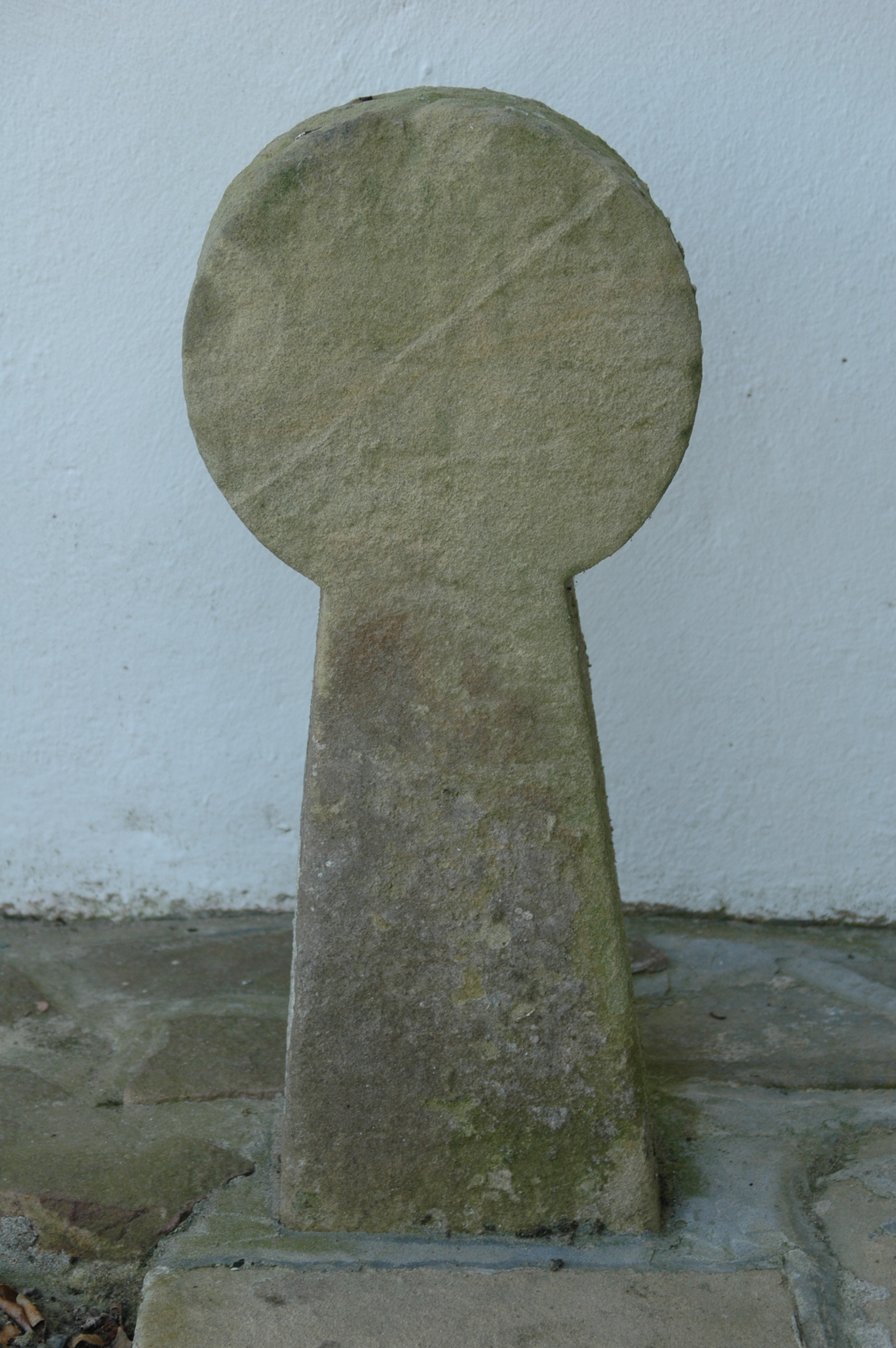 Biriatou, stèle discoïdale